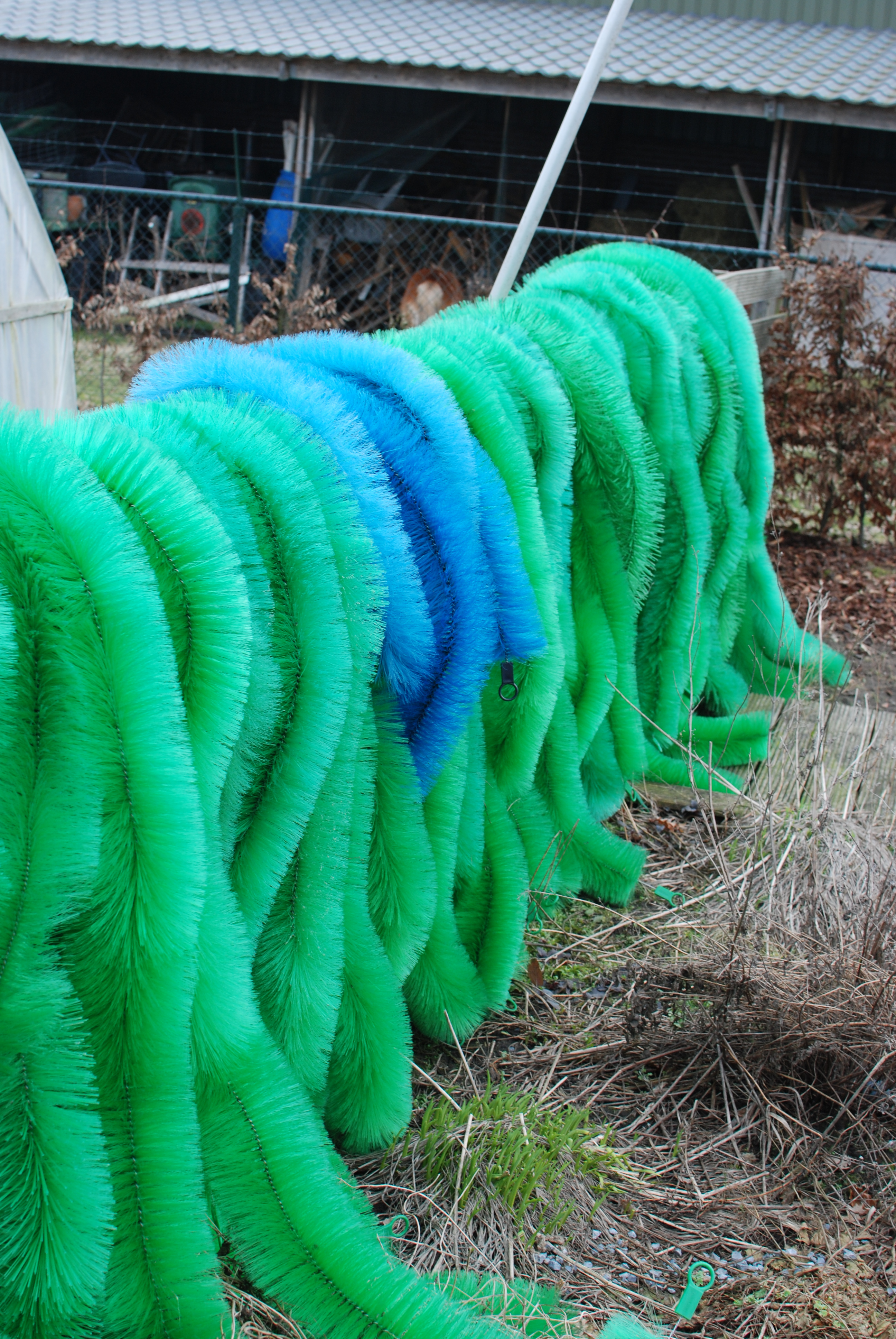 Ablaicgbürsten von einer Koi Zucht Anlage